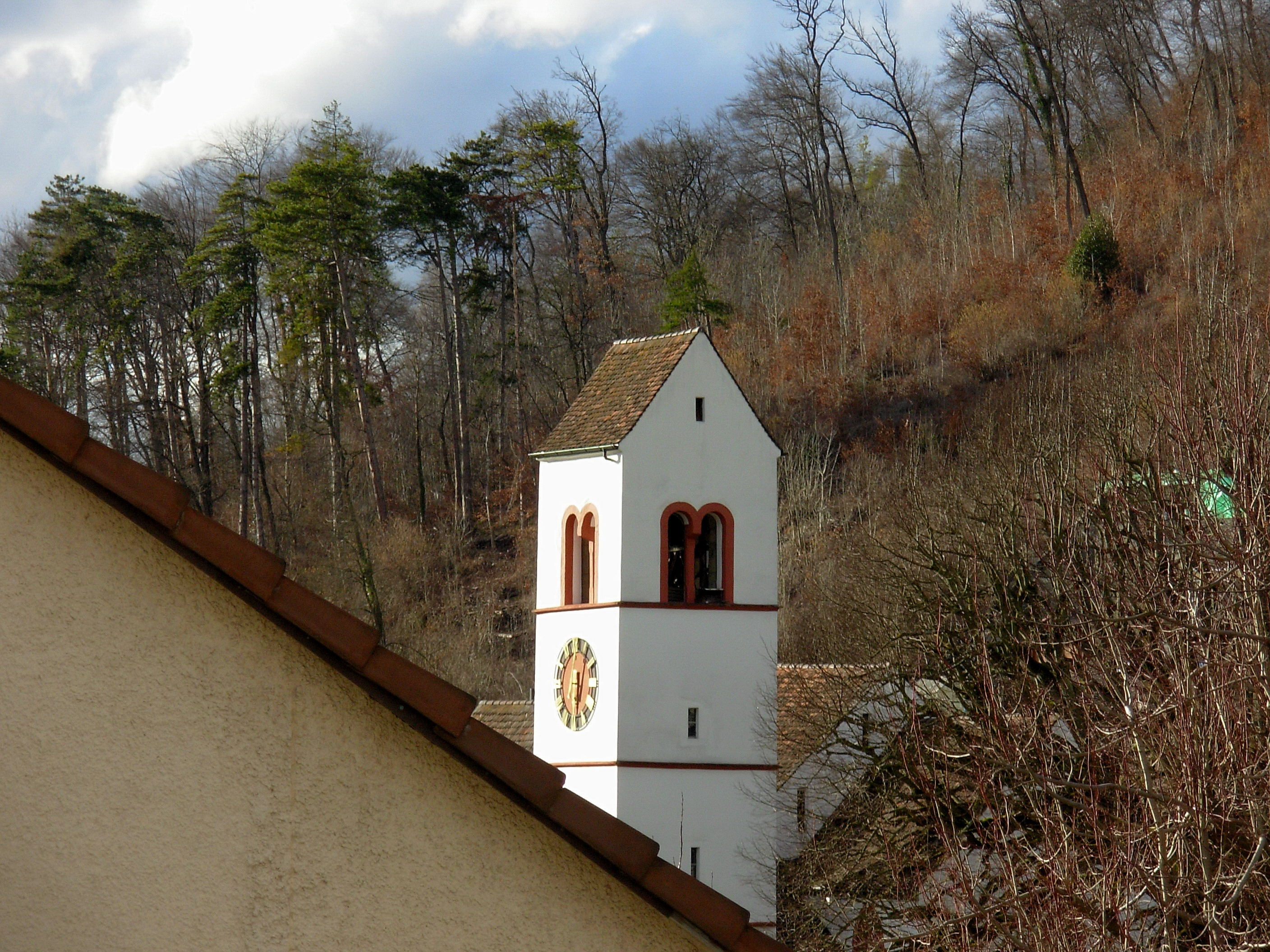 Bildbeschreibung: Foto der Kirche in Lausen BL /Schweiz Fotograf/Zeichner: Kevin Näf Datum: 29.03.2006 Sonstiges: ...